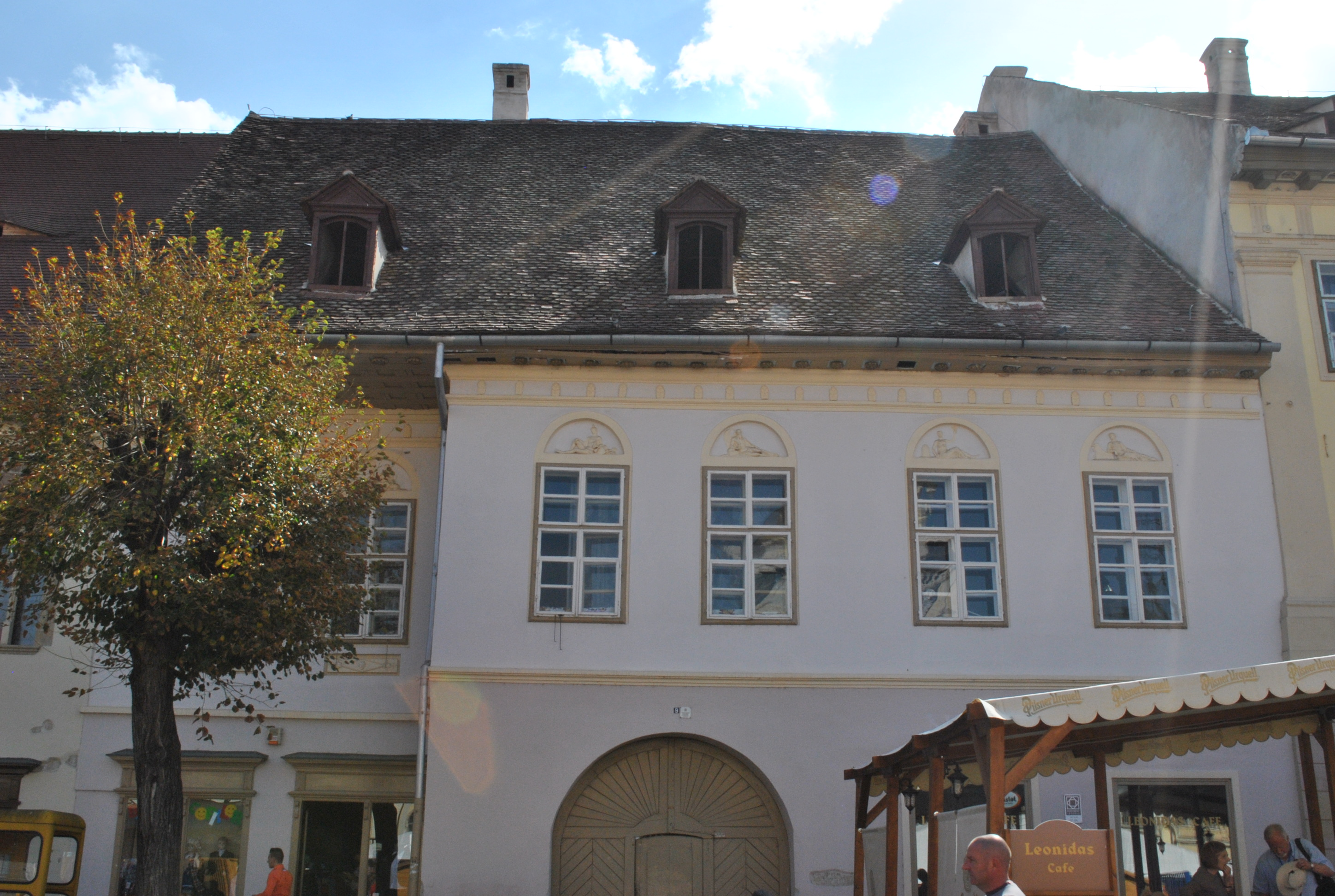 Casă, sec. XV, transformări post 1828